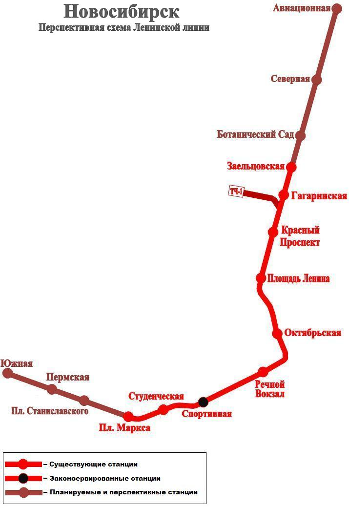 Новосибирский метрополитен: Ленинская линия. Перспективная схема развития